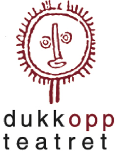 Dukkoppteatret ble opprettet i 1994 i Tromsø av Brit Steinsvik